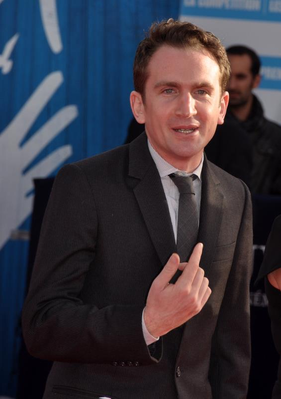 Jake Schreier au festival du film américain de Deauville